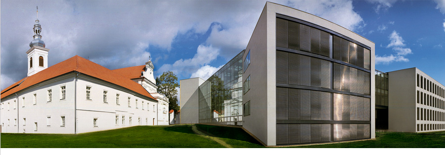 Česky: Vzdělávací centrum na Karmeli